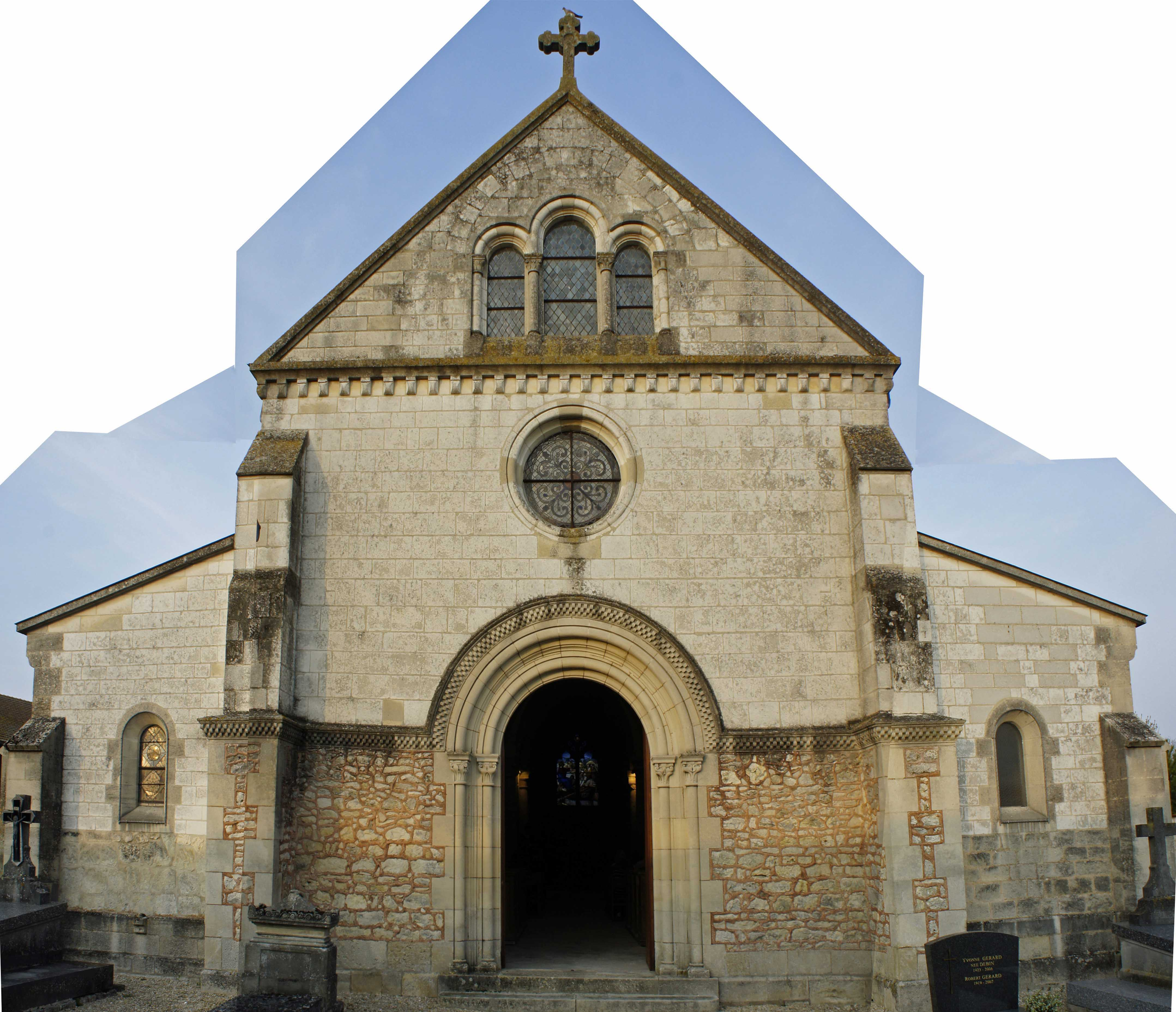 Église, le portail ouest à Coolus.